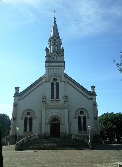 paisagem tipica